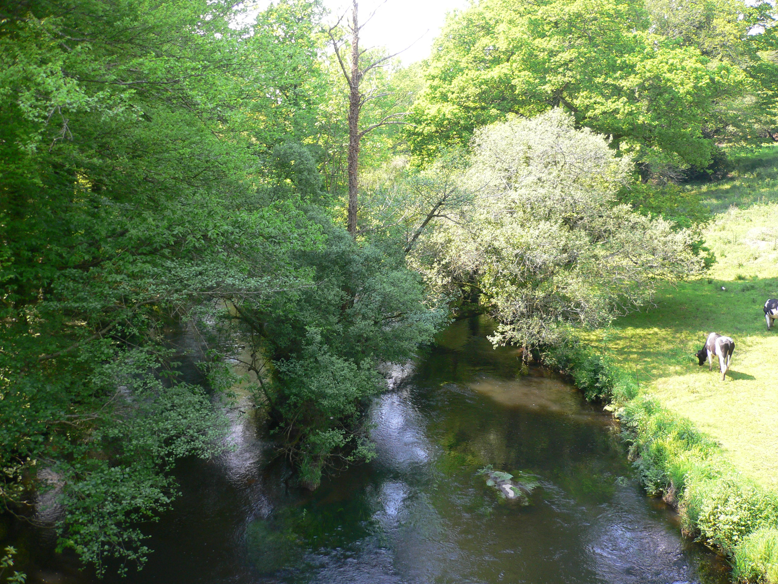 rivière Inam à Lanvénégen